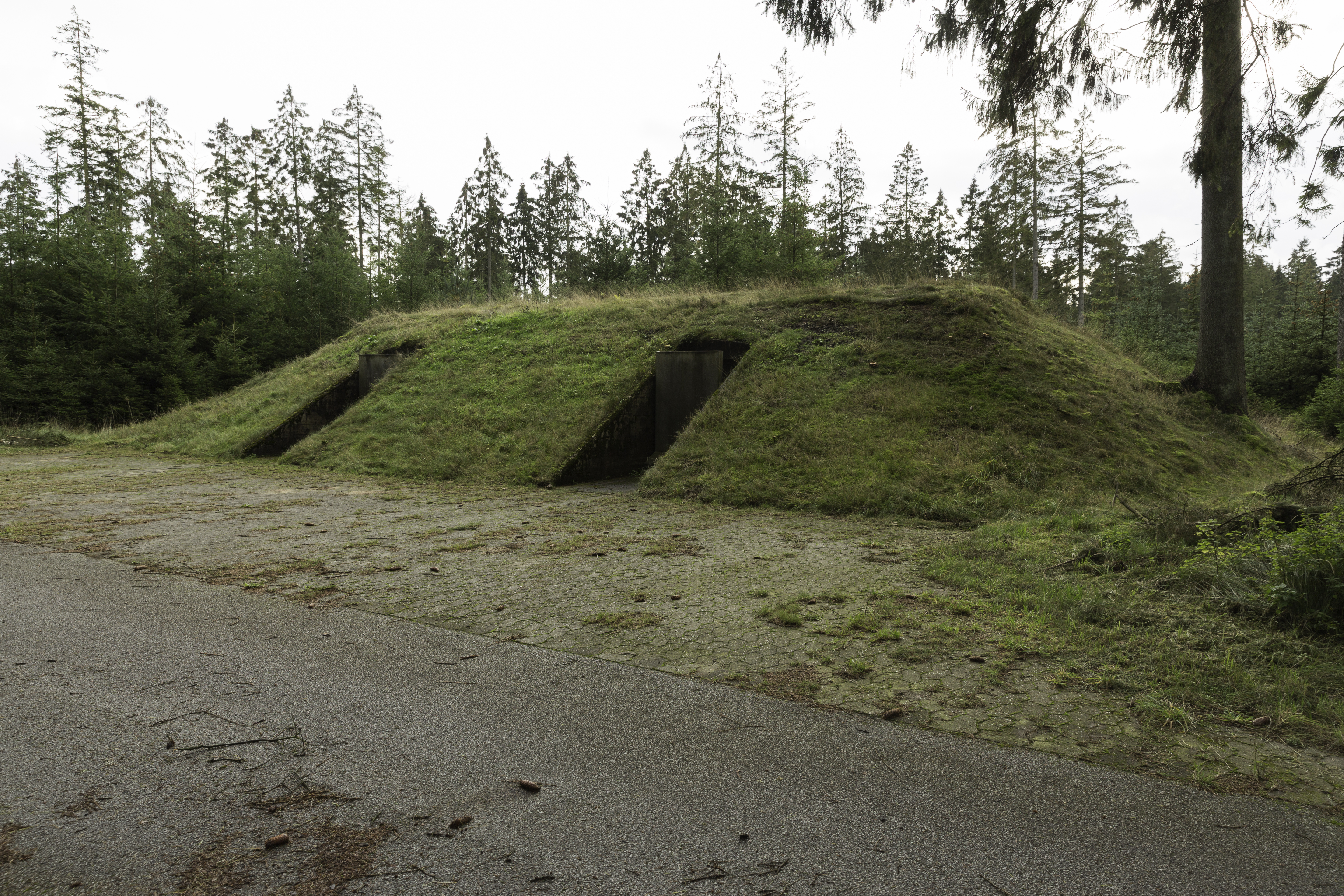 Bunker i Ammunitionsdepot Hjøllund